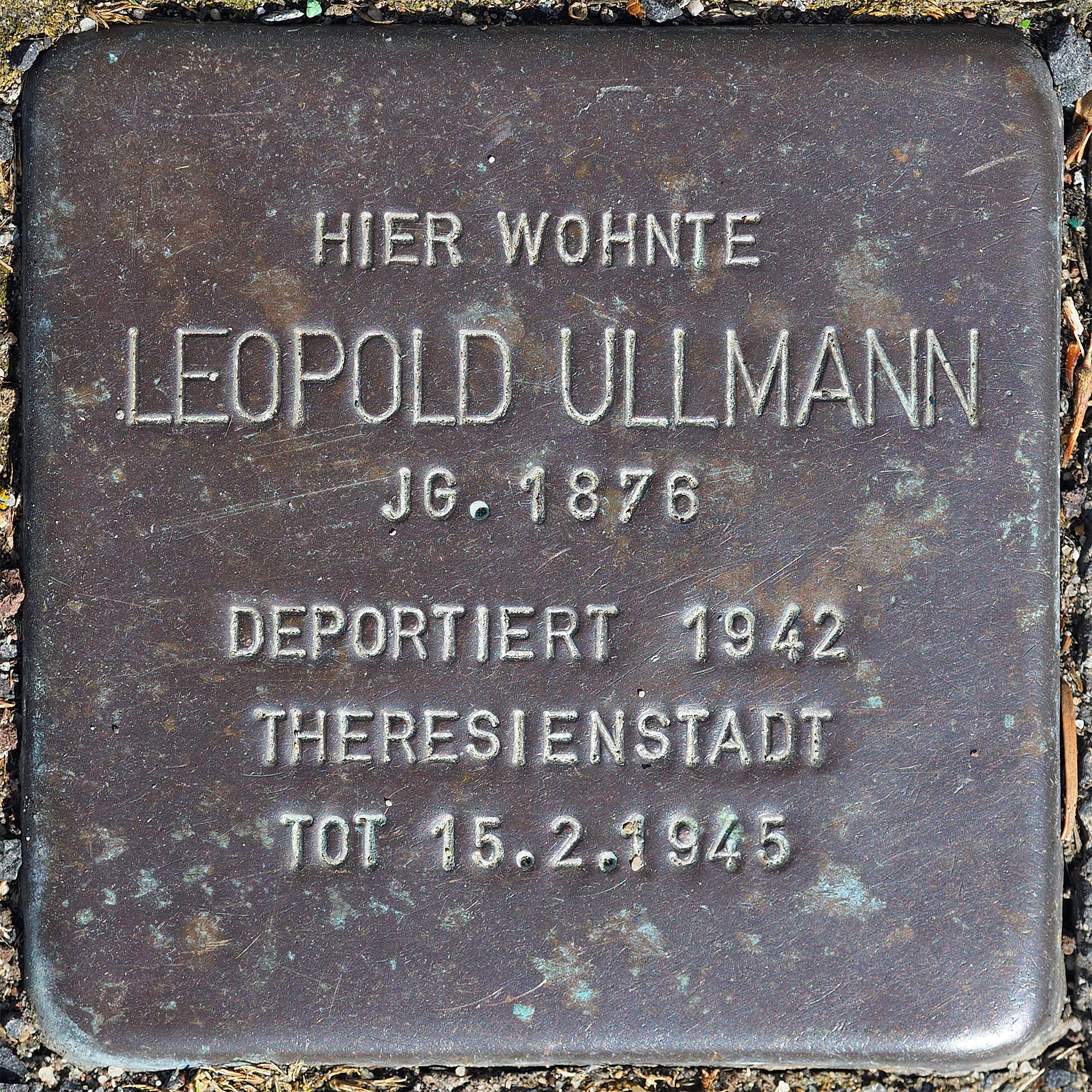 Stolpersteine MG: Ullmann, Leopold